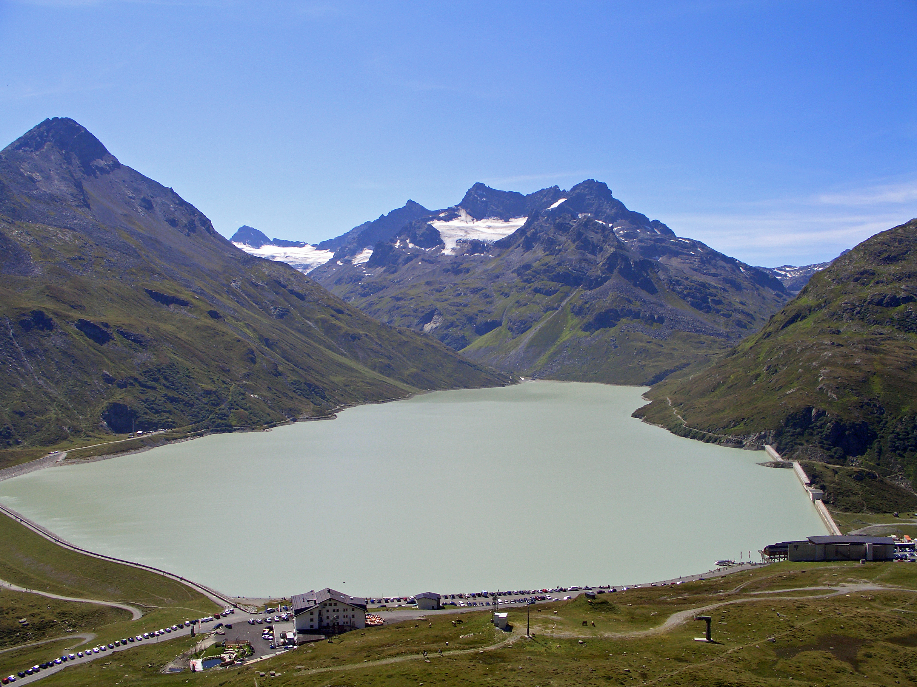 Silvrettastausee